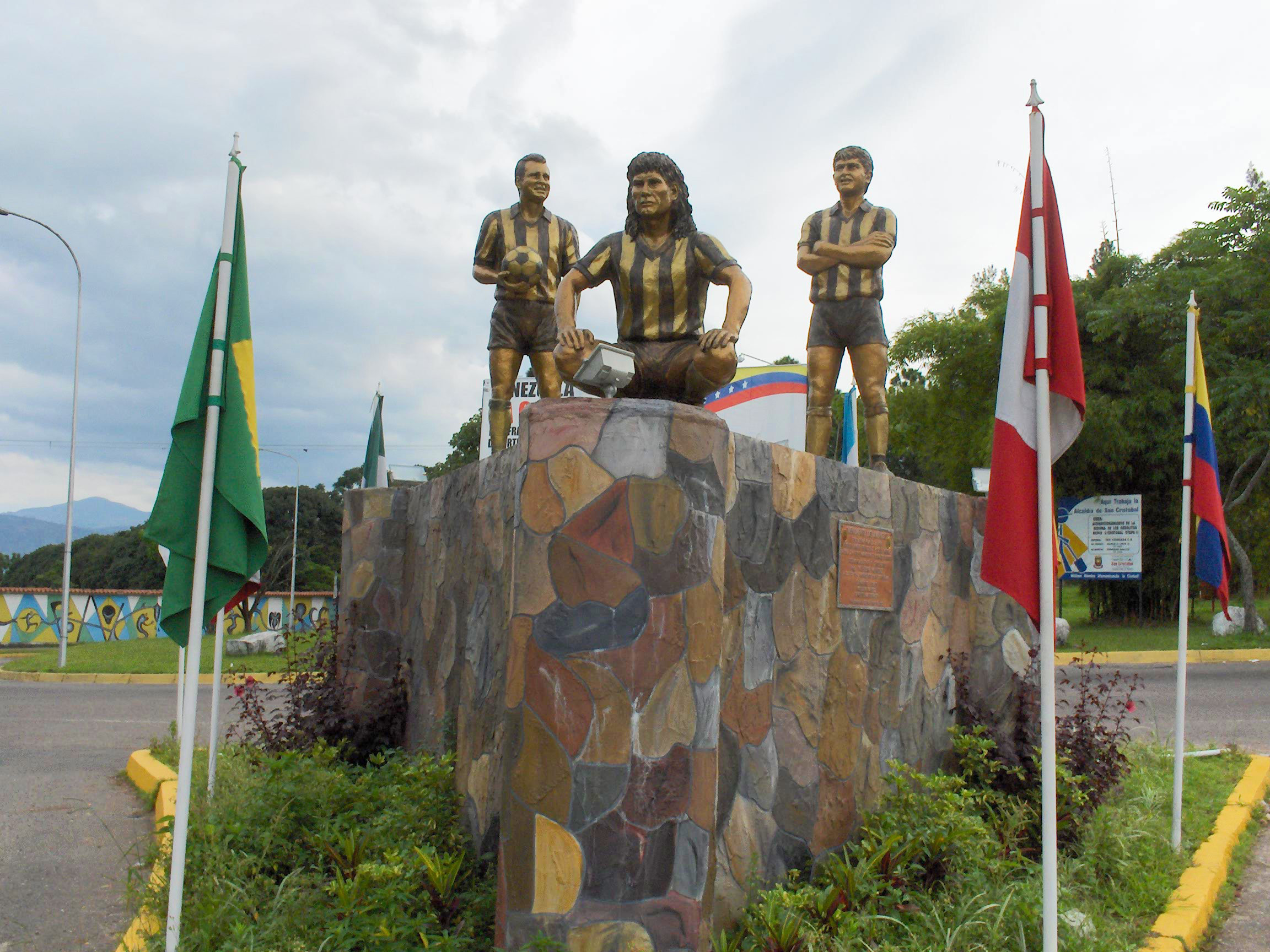 Conjunto escultórico LAS AMÉRICAS